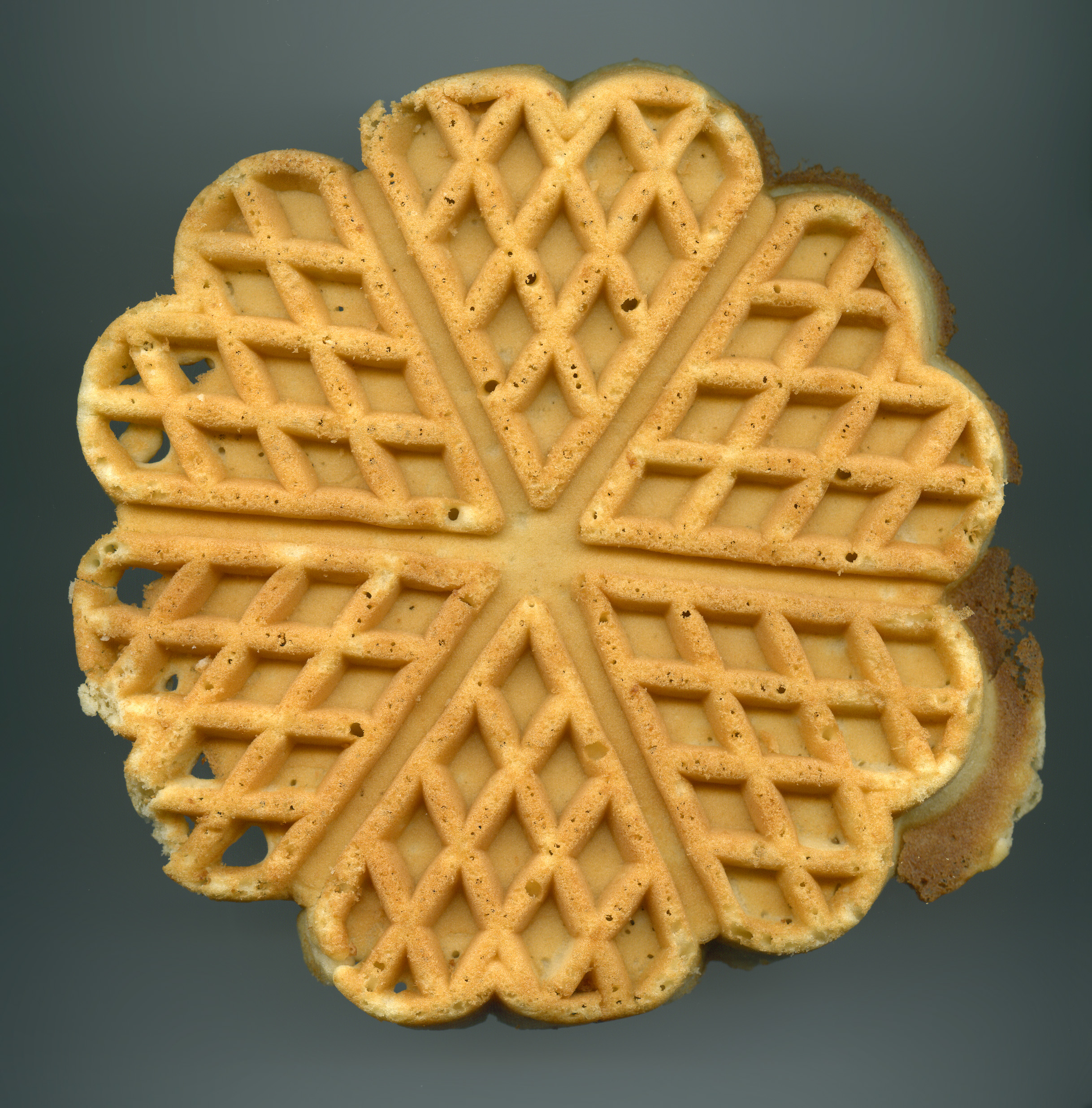 Waffel.